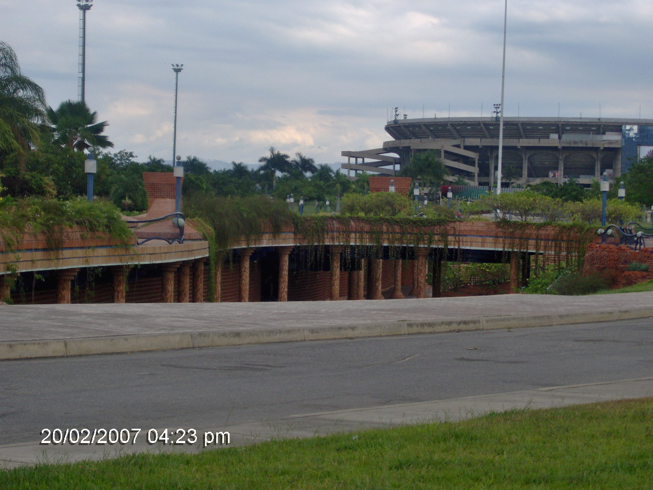 Estación Monumental del Metro de Valencia.